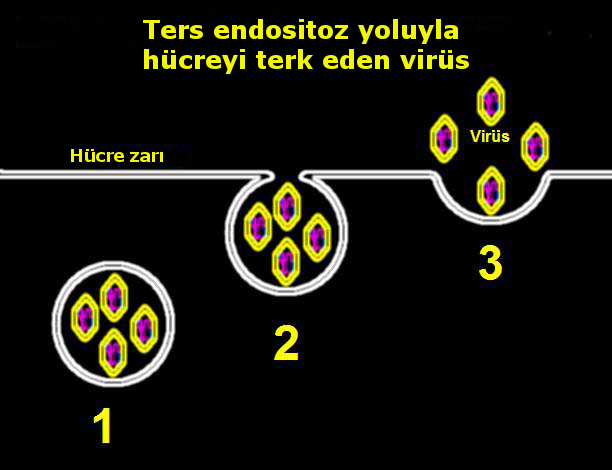 Ekzositoz yoluyla viral çıkış.